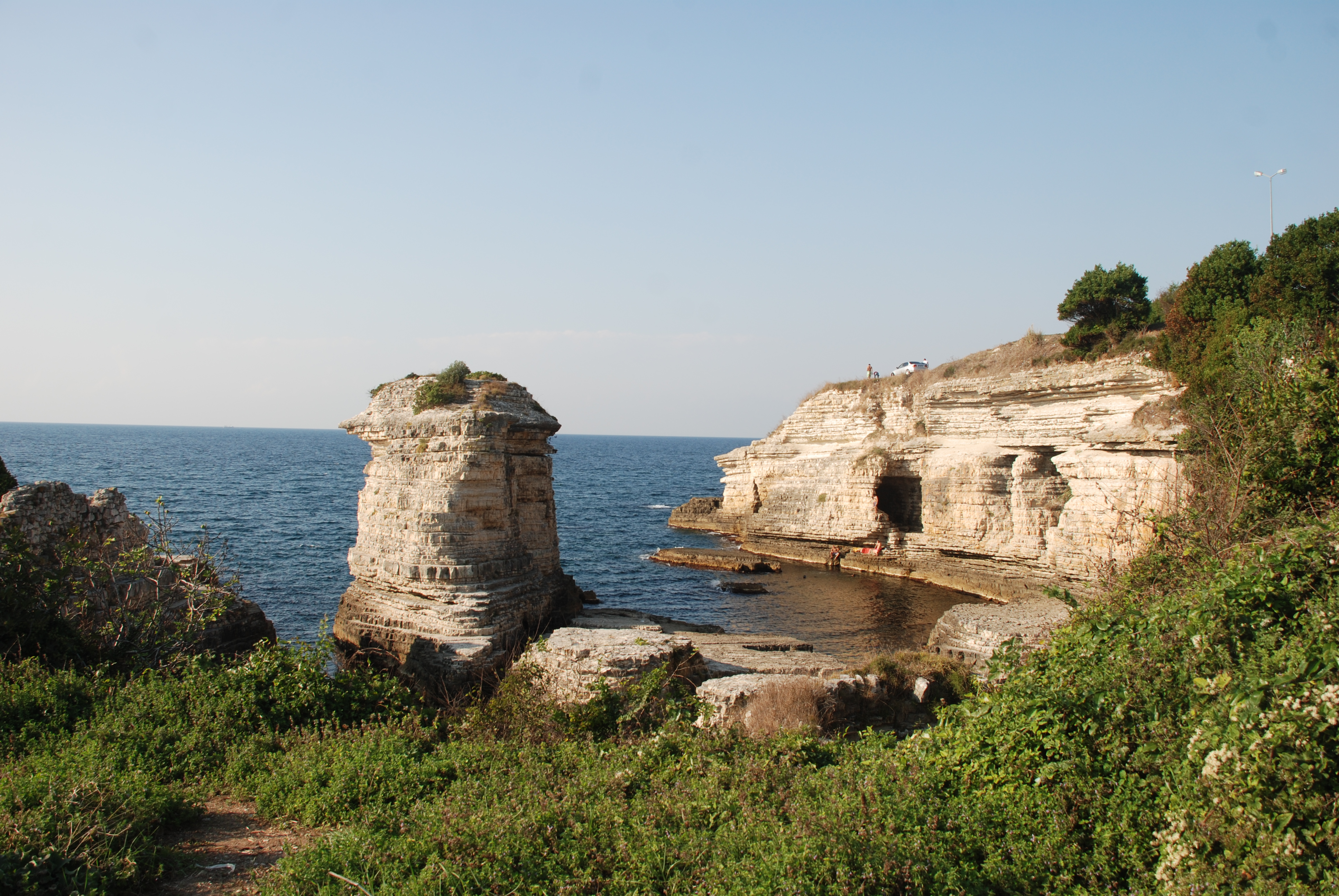 Kerpe'de bir falez.